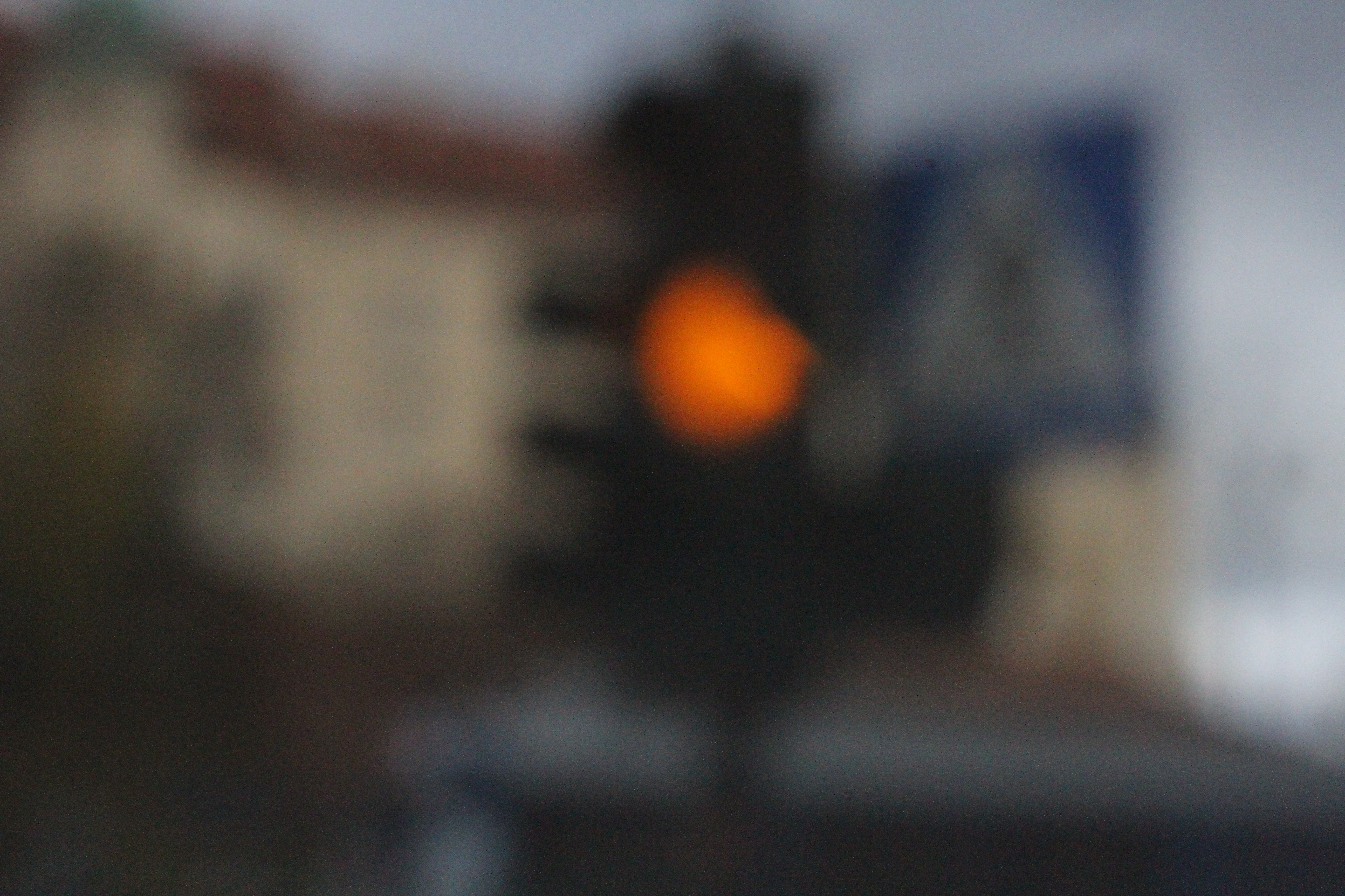 Warunki pogodowe - pochmurny, deszczowy dzień. Utrwalono na matrycy aparatu Canon EOS 7d przy czułości 6400 ISO.